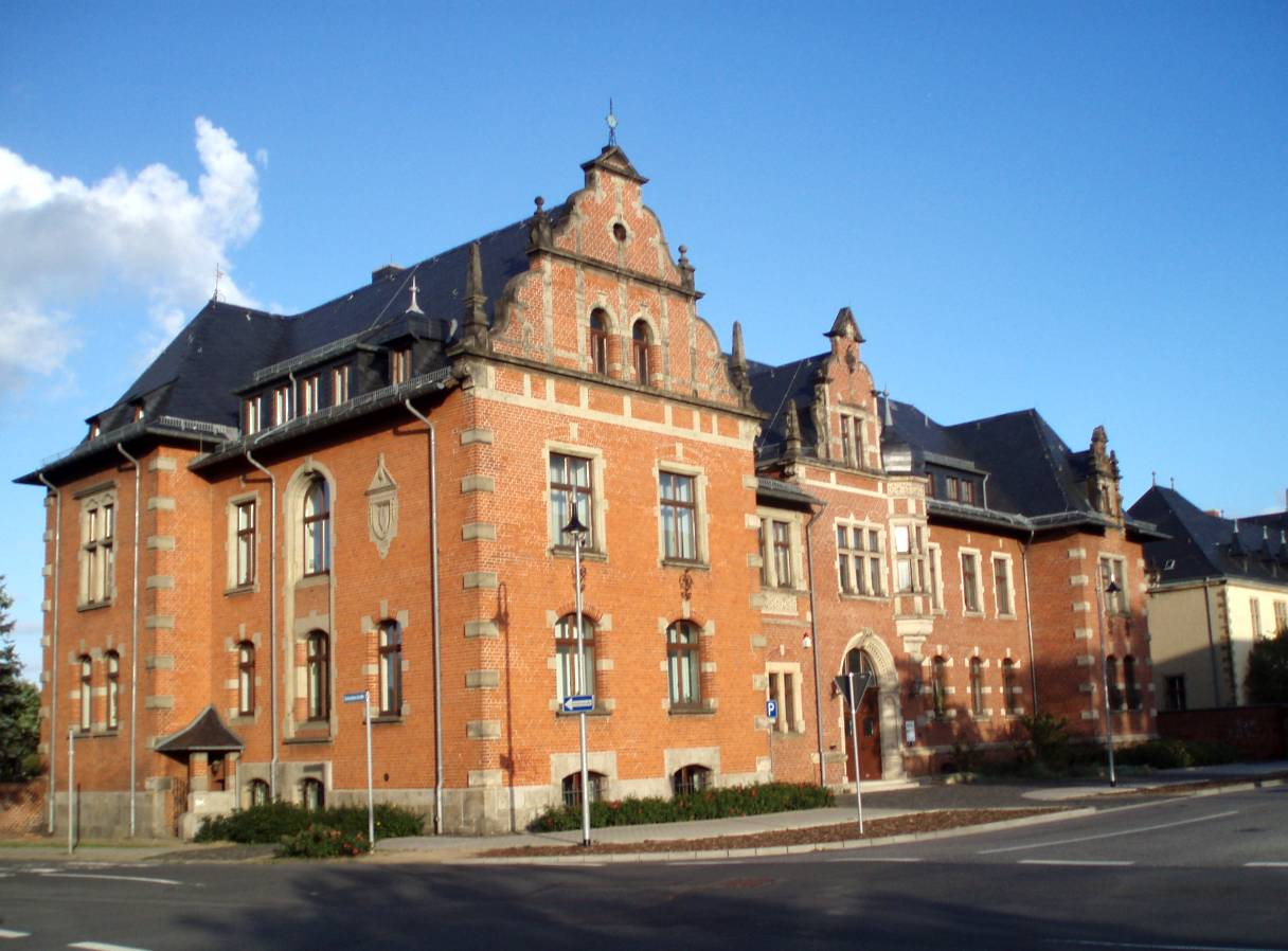 Landratsamt Wernigerode, Rudolf-Breitscheid-Straße